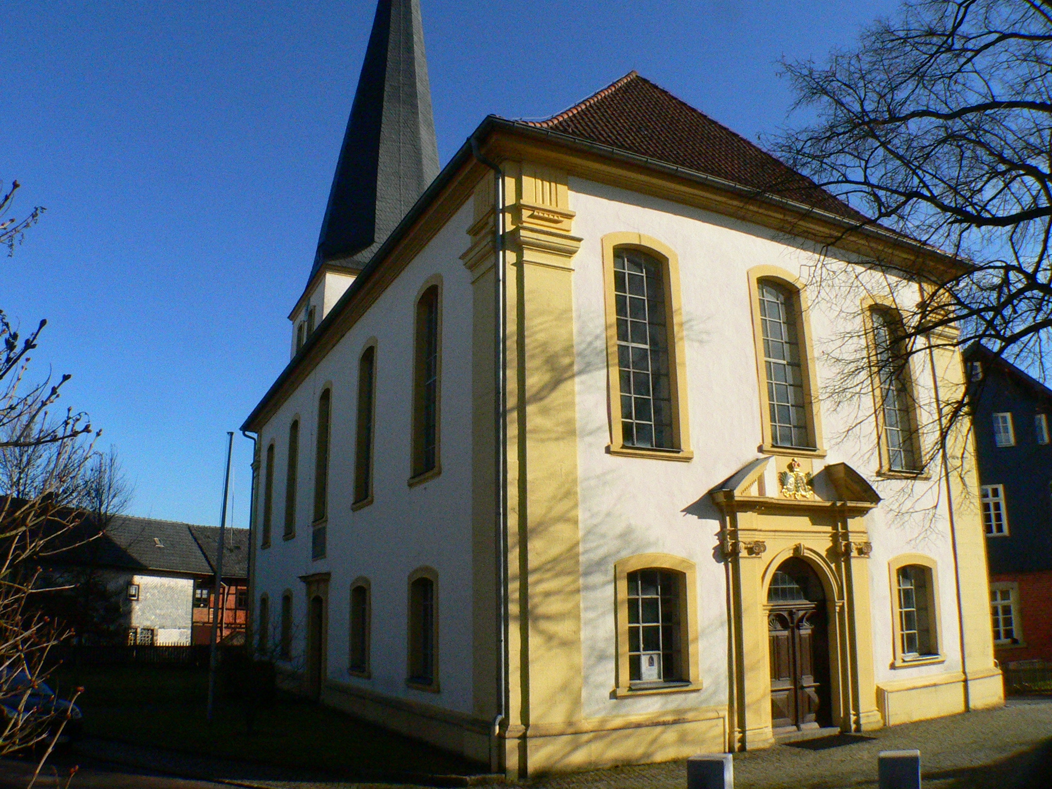 Gauerstadt, evangelische Kirche, Spät-Rokoko